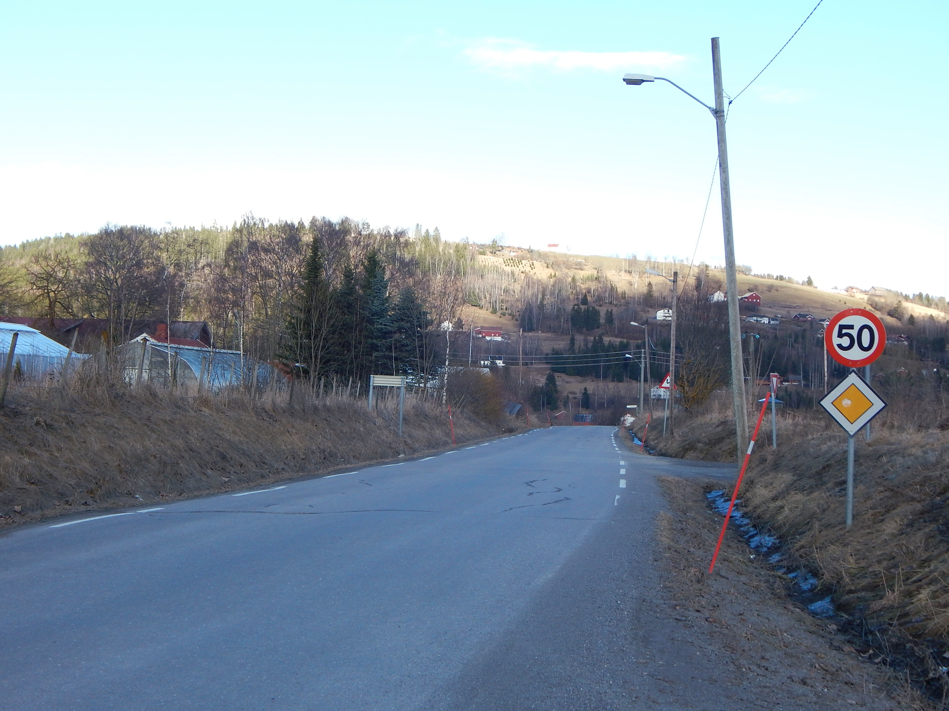 Lunnerlinna (fylkesvei 2294, tidl. FV17) mellom Gjøvikbanen og riksvei 4